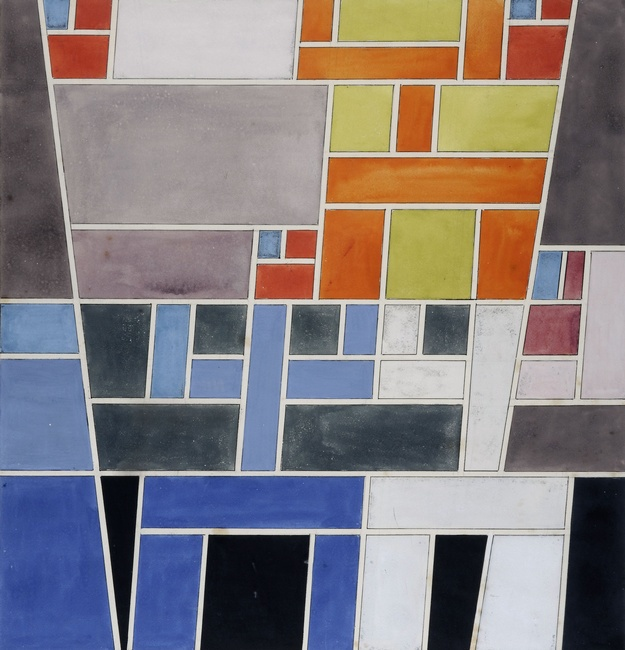 Maquette pour le vitrail Composition abstraite désaxée (LVIII 6). 45 x 43,5 cm. Don de Mme Marguerite Arp-Hagenbach en 1970. Musée d'art moderne et contemporain de Strasbourg Native nameMusée d'art moderne et contemporain de Strasbourg (MAMCS)LocationStrasbourgCoordinates48° 34′ 47″ N, 7° 44′ 10″ E Established1998Website control VIAF: 154508345 ISNI: 0000 0001 2324 9632 SUDOC: 026393344 BNF: 11864928r Museofile: M0016